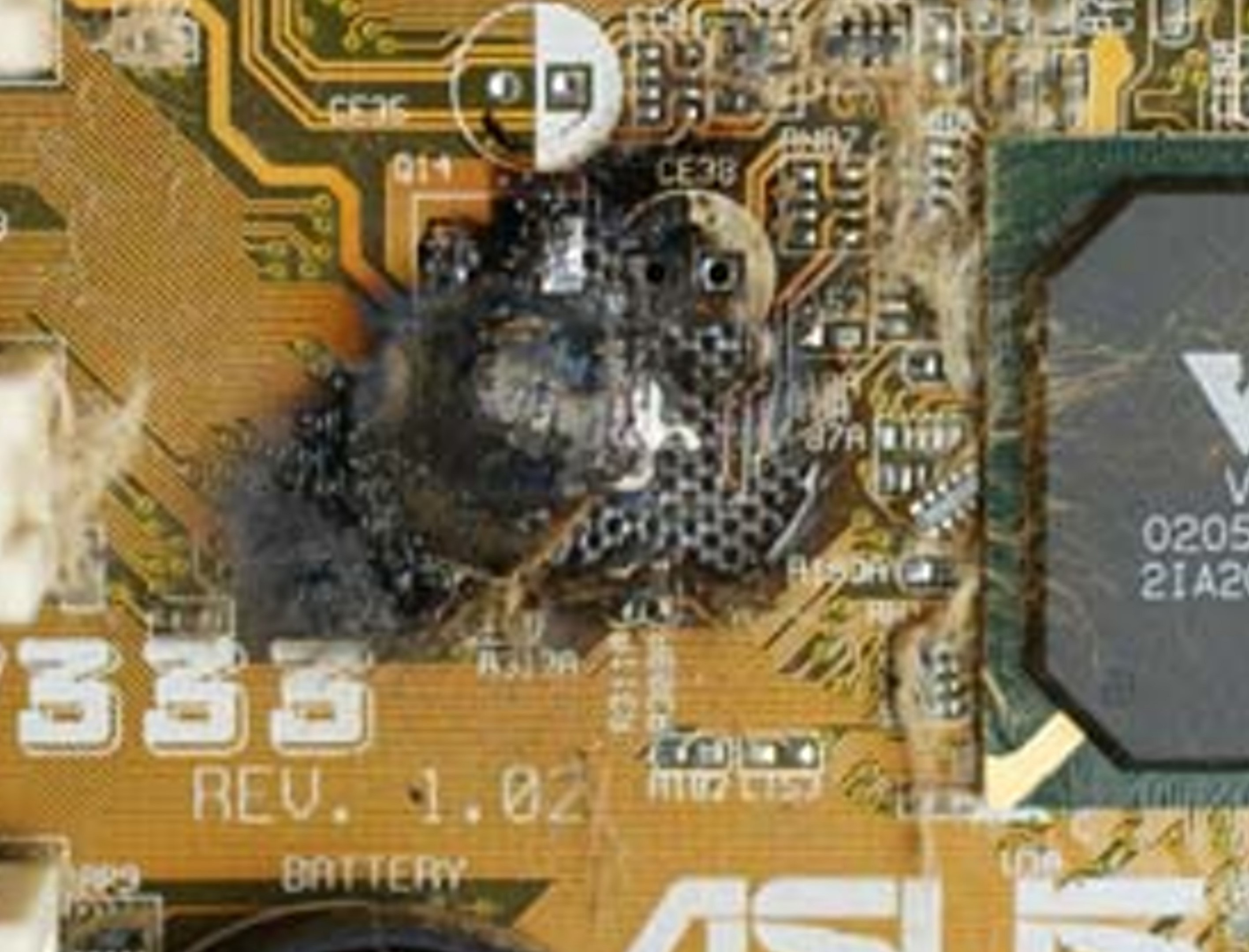 Aufnahme einer Platine, auf der es durch ausgelaufenen Elektrolyten zu einem Brand gekommen war